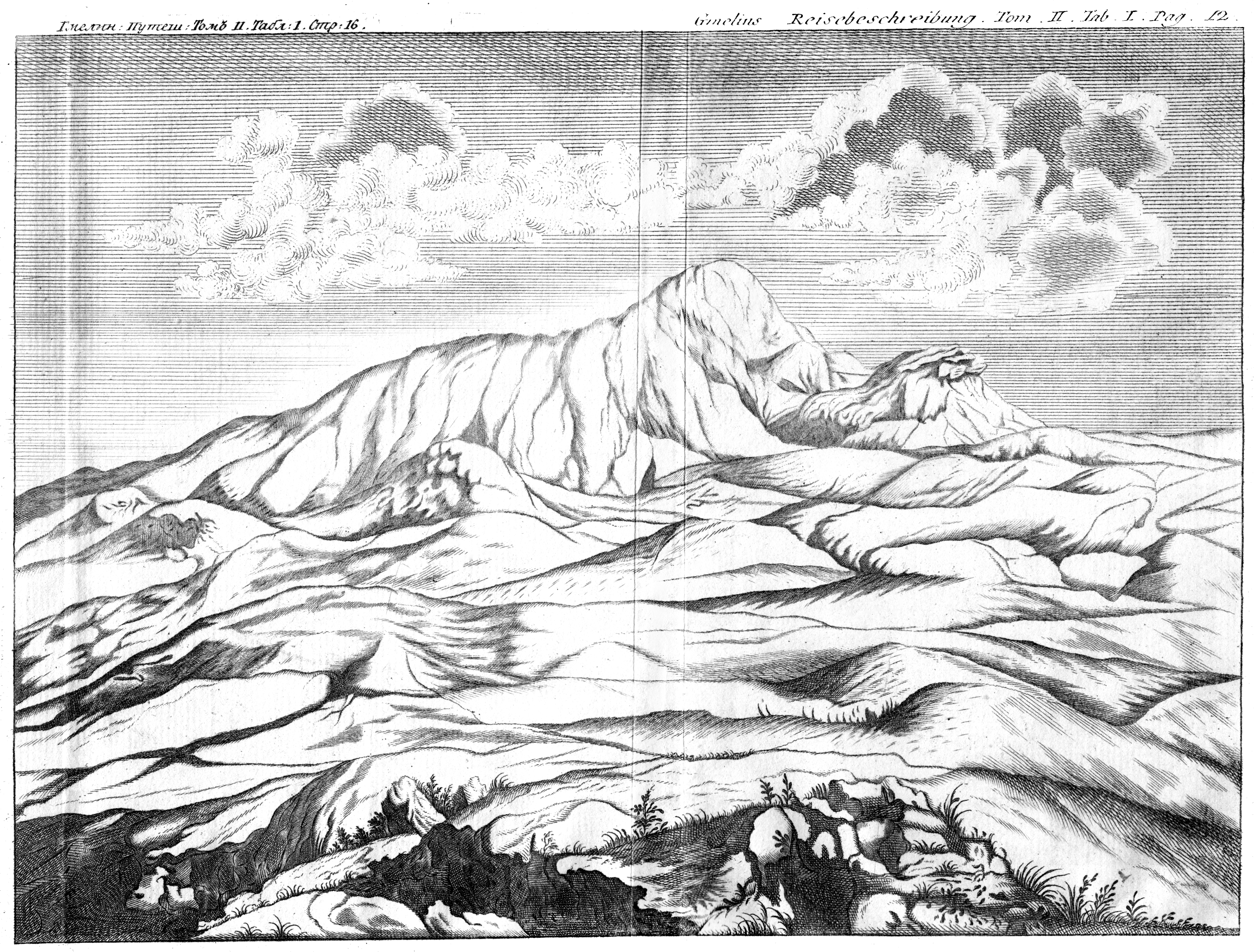 Гора Большое Богдо, рисунок 1769-1770 года. Опубликовано в 1783 г. Гмелин Самуйл Георг. Путешествие по России для исследования трех царств природы: Перевод с немецкого. Часть 2. С начала августа 1769 по 5 июля 1770 года, которое время заключает путешествие от Черкаска до Астрахани и пребывание в сем городе. СПб: Императорская Академия наук, 1783. Таб. 1.